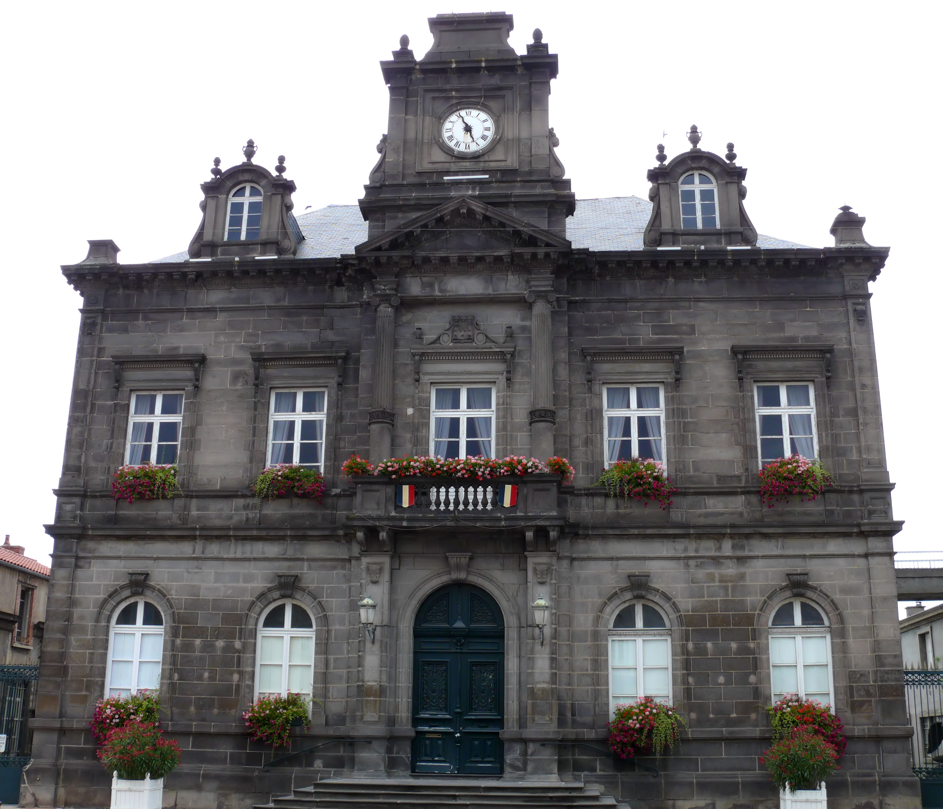 Billom - Hôtel de ville